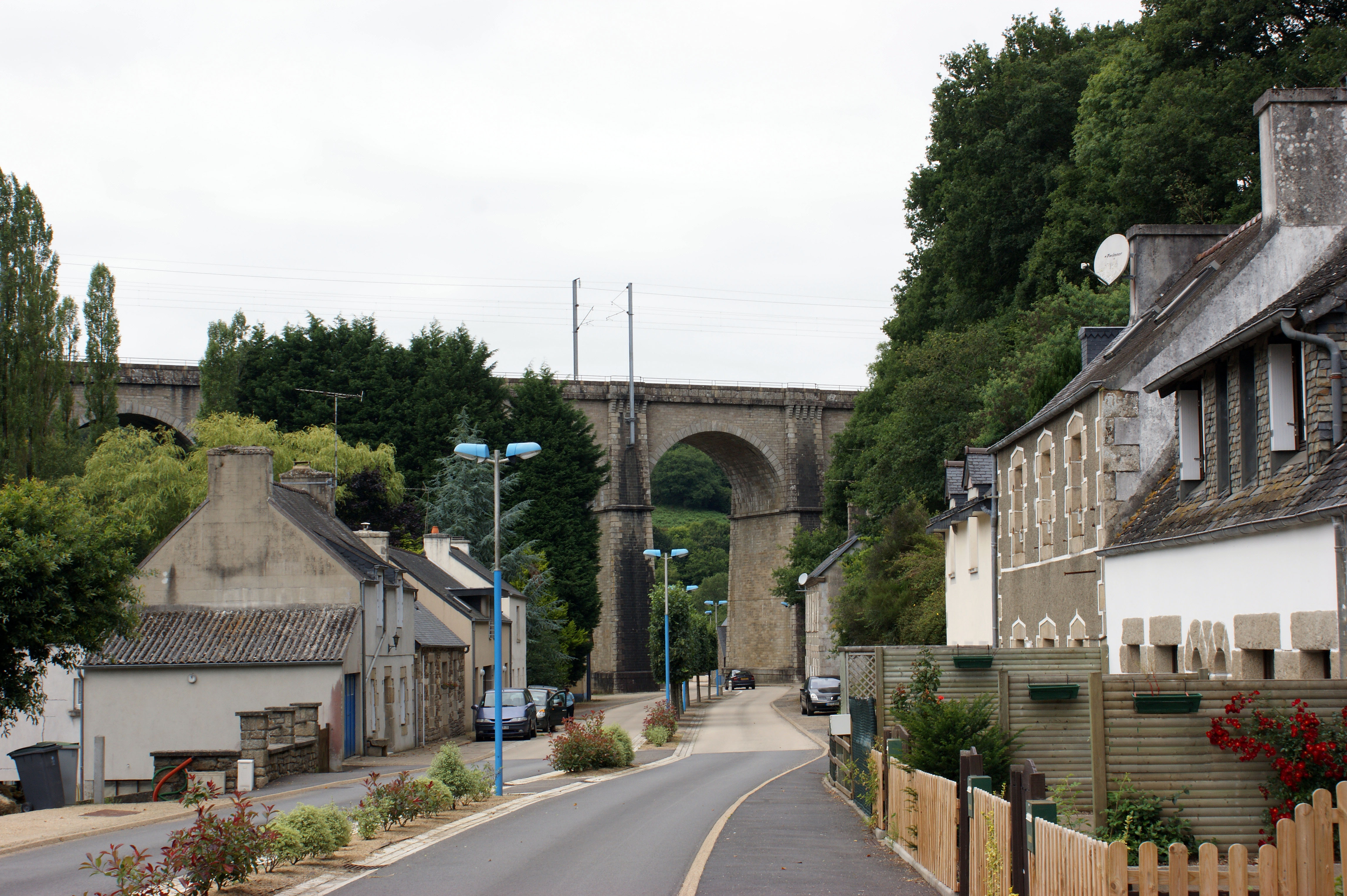 Le viaduc de Le Ponthou qui permet le passage de ligne de Paris-Montparnasse à Brest.